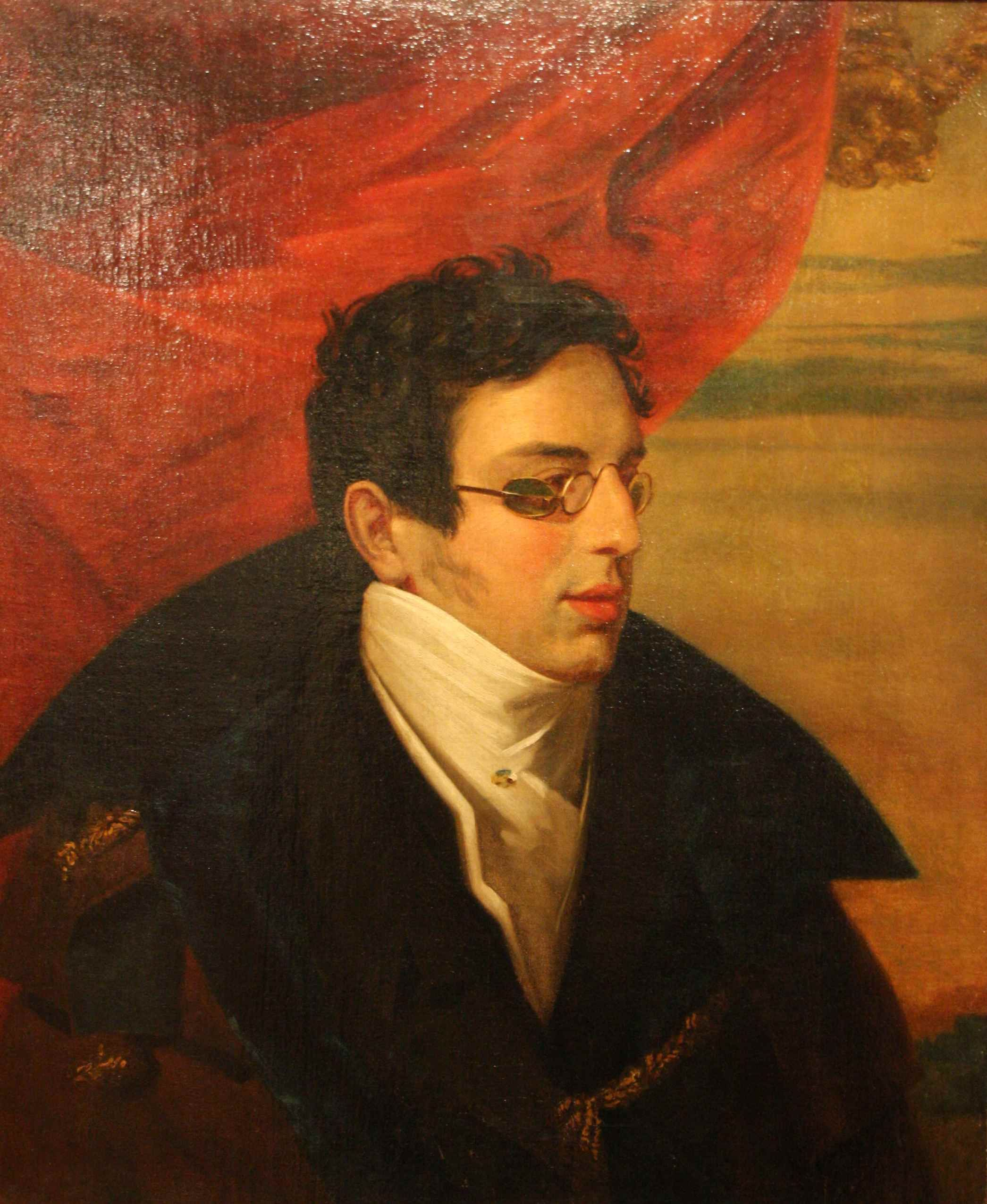 Nikolay Gnedich. Николай Гнедич. Л\Копия с утерянного оригинала О.А.Кипренского.